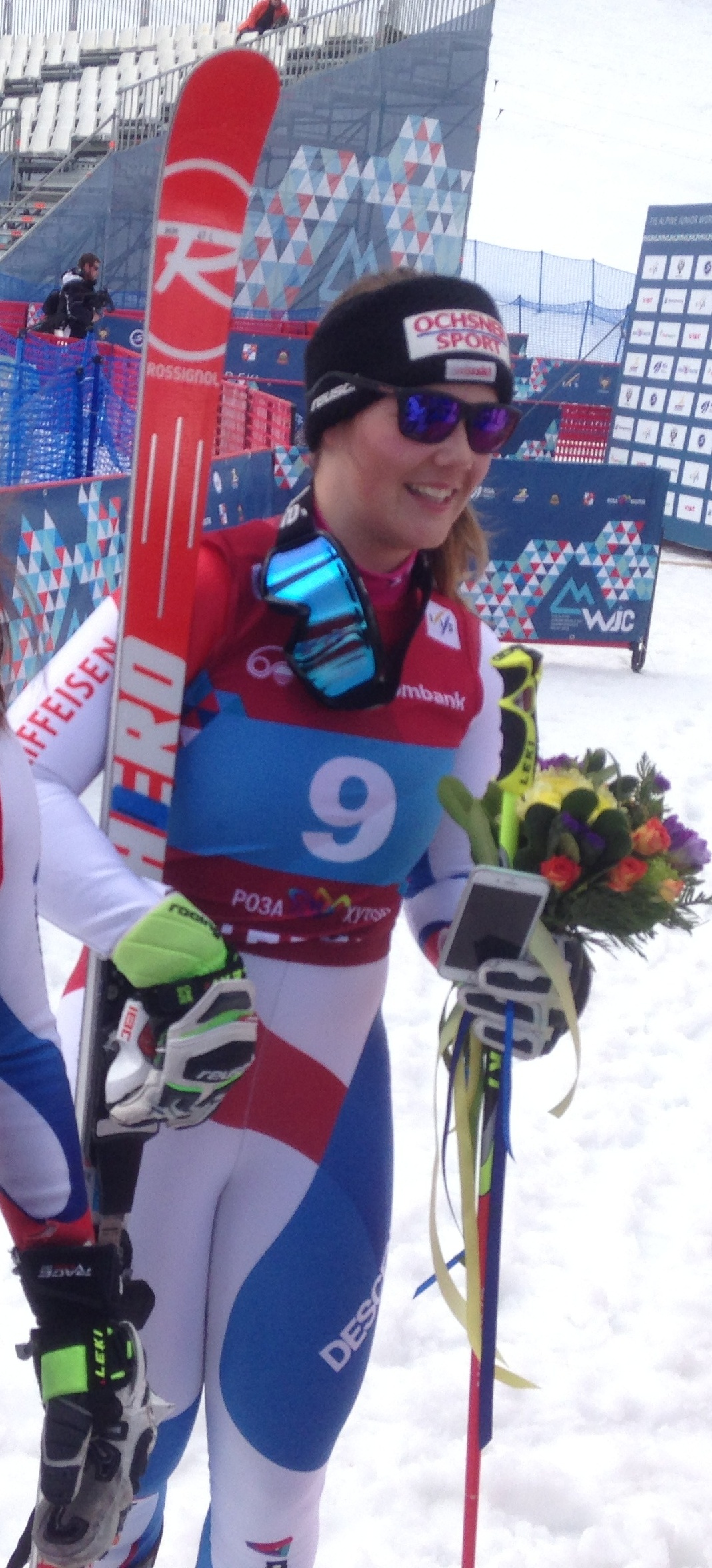 Чемпион мира 2016 года в гигантском слаломе среди юниорок Жасмина Сутер (слева) и бронзовый призер Мелани Мейллард, обе из Швейцарии по сле цветочной церемонии на горнолыжном курорте Роза Хутор.